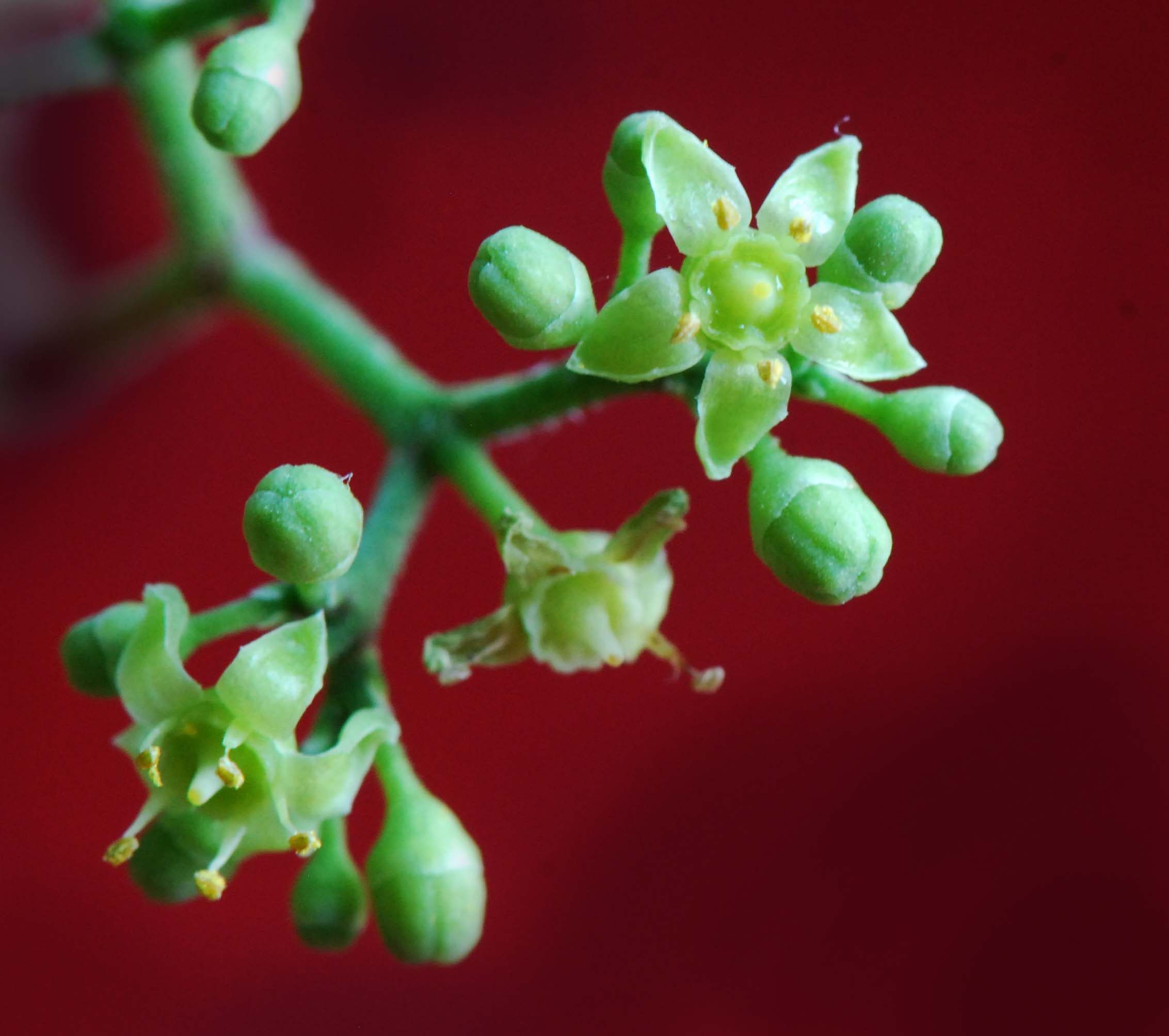 Ampelopsis brevipedunculata, fleurs, Jardin des Plantes de Paris